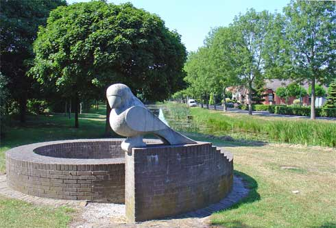 Het Zeelandstreekje in de Drouwenermond anno 2006 ter herinnering aan de vestiging van kolonisten uit Zeeland in 1844